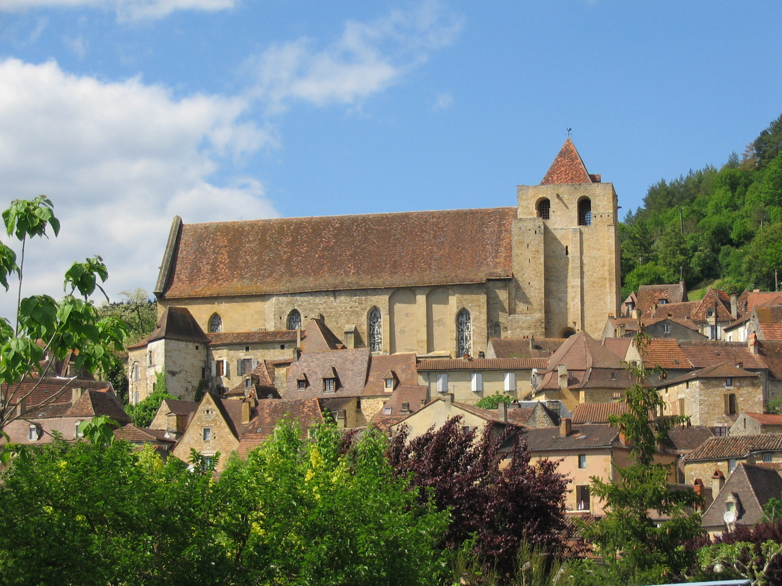 Eglise de Saint Cyprien